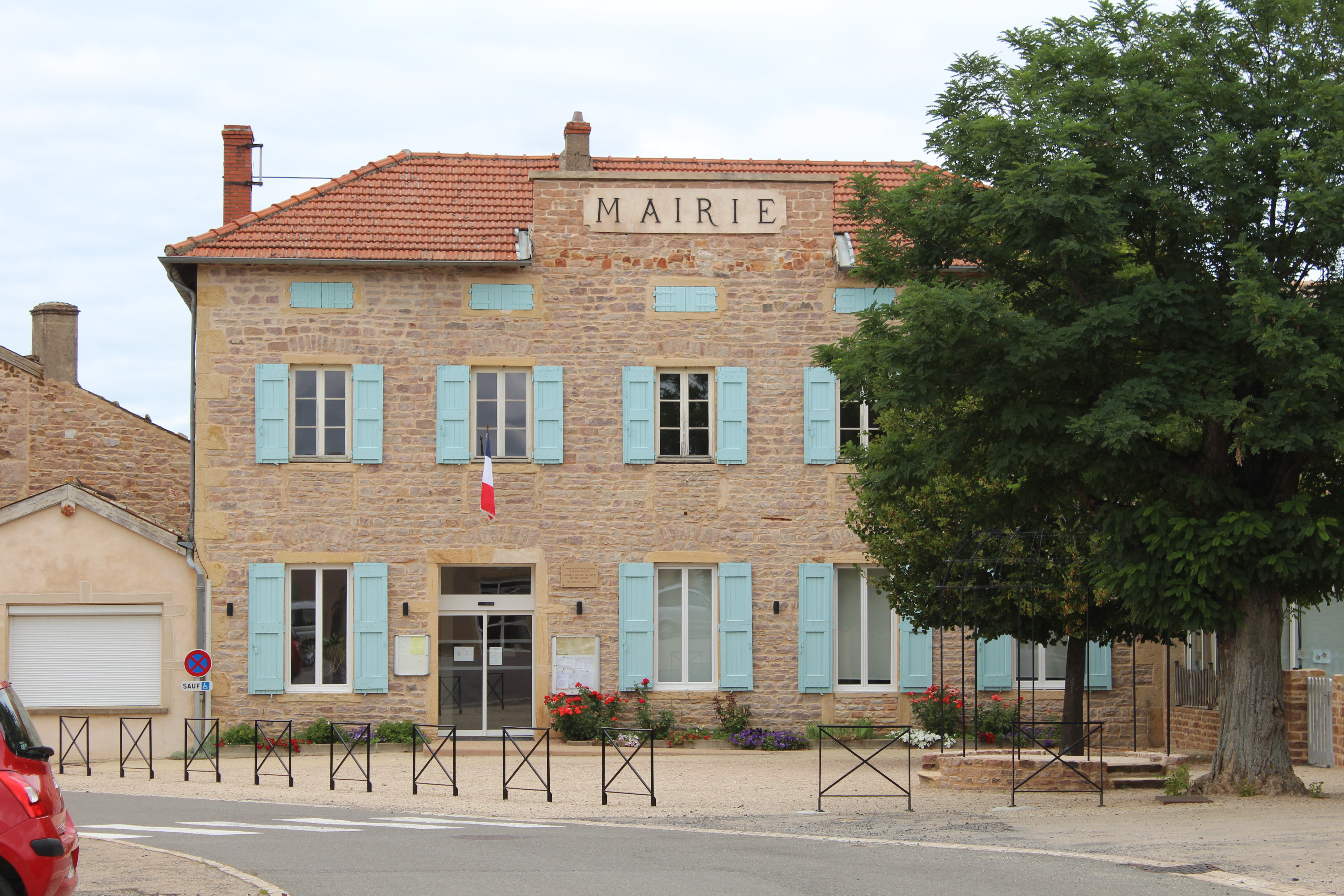 Mairie de Saint-Amour-Bellevue.